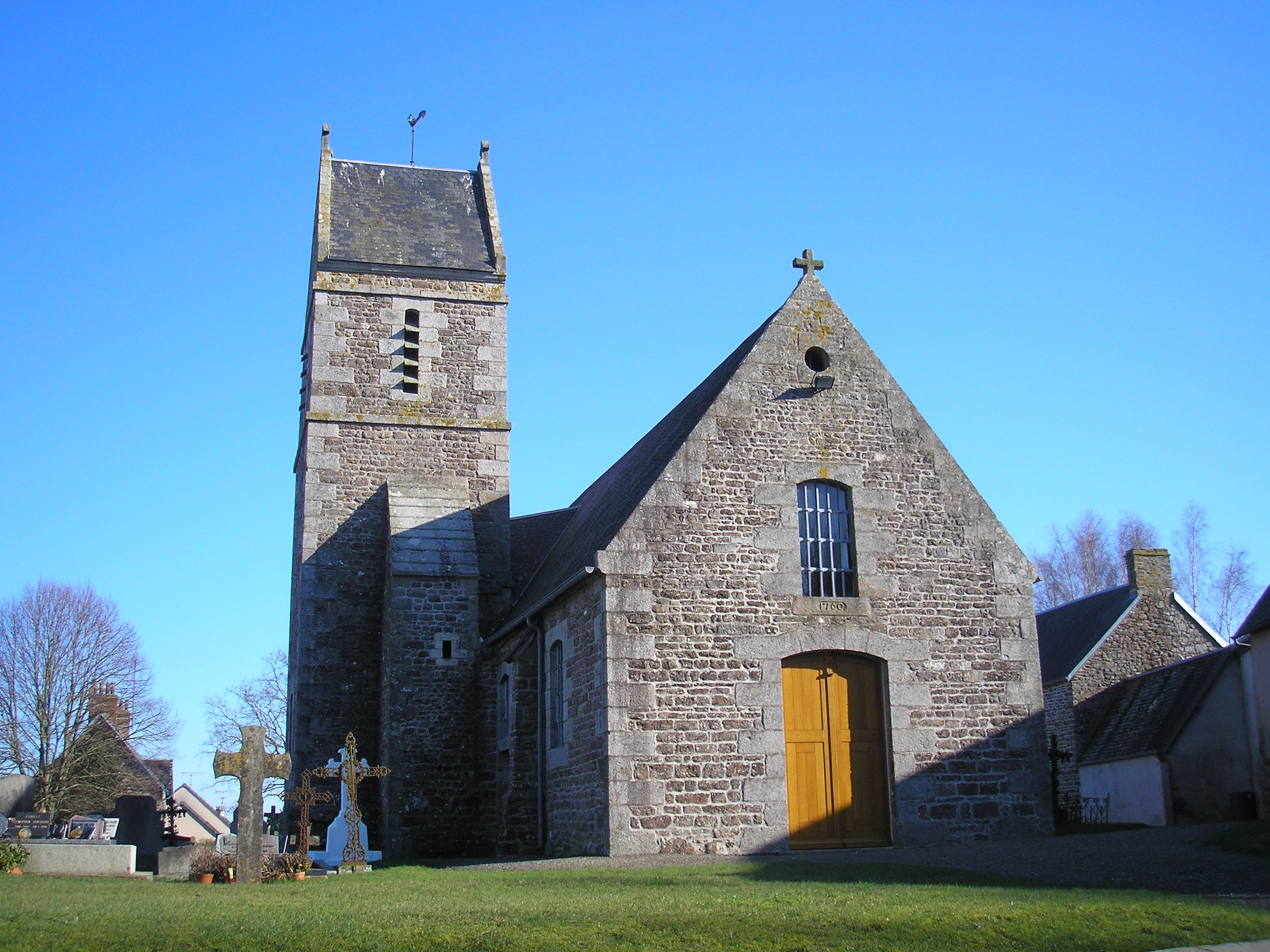 Anctoville-sur-Boscq (Normandie, France). L'église Saint-Martin.